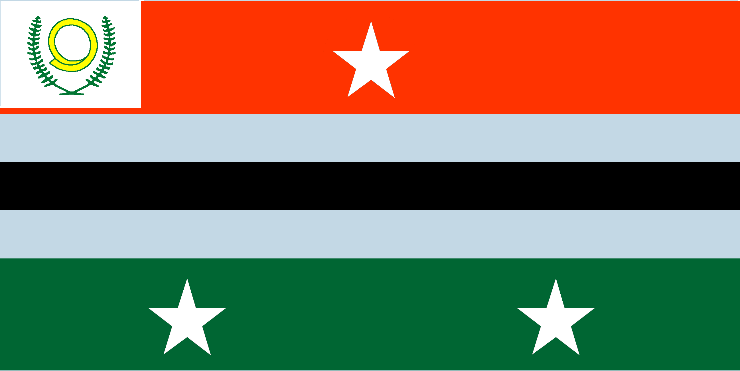 Flag of Penama, Vanuatu